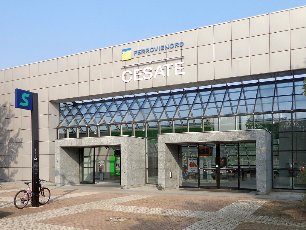 Stazione ferroviaria di Cesate, il fabbricato viaggiatori.